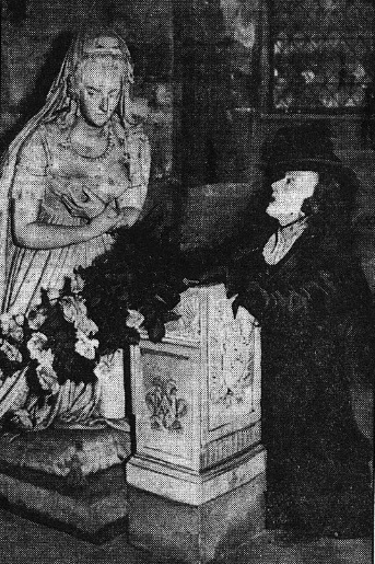 Cécile Sorel fleurissant l'orant de la reine Marie-Antoinette, en la basilique Saint-Denis, le 16 octobre 1941. La photographie fut publiée pour la première fois en une du journal Le Matin (numéro du 17 octobre 1941) avec la légende suivante : « À l'occasion de l'anniversaire de la mort de Marie-Antoinette, la grande artiste Cécile Sorel, qui interprête si souvent le rôle de la malheureuse reine à la scène, s'est rendue à la basilique Saint-Denis, où se trouve le tombeau. Notre photo la montre agenouillée lors de ce pieux pèlerinage ».